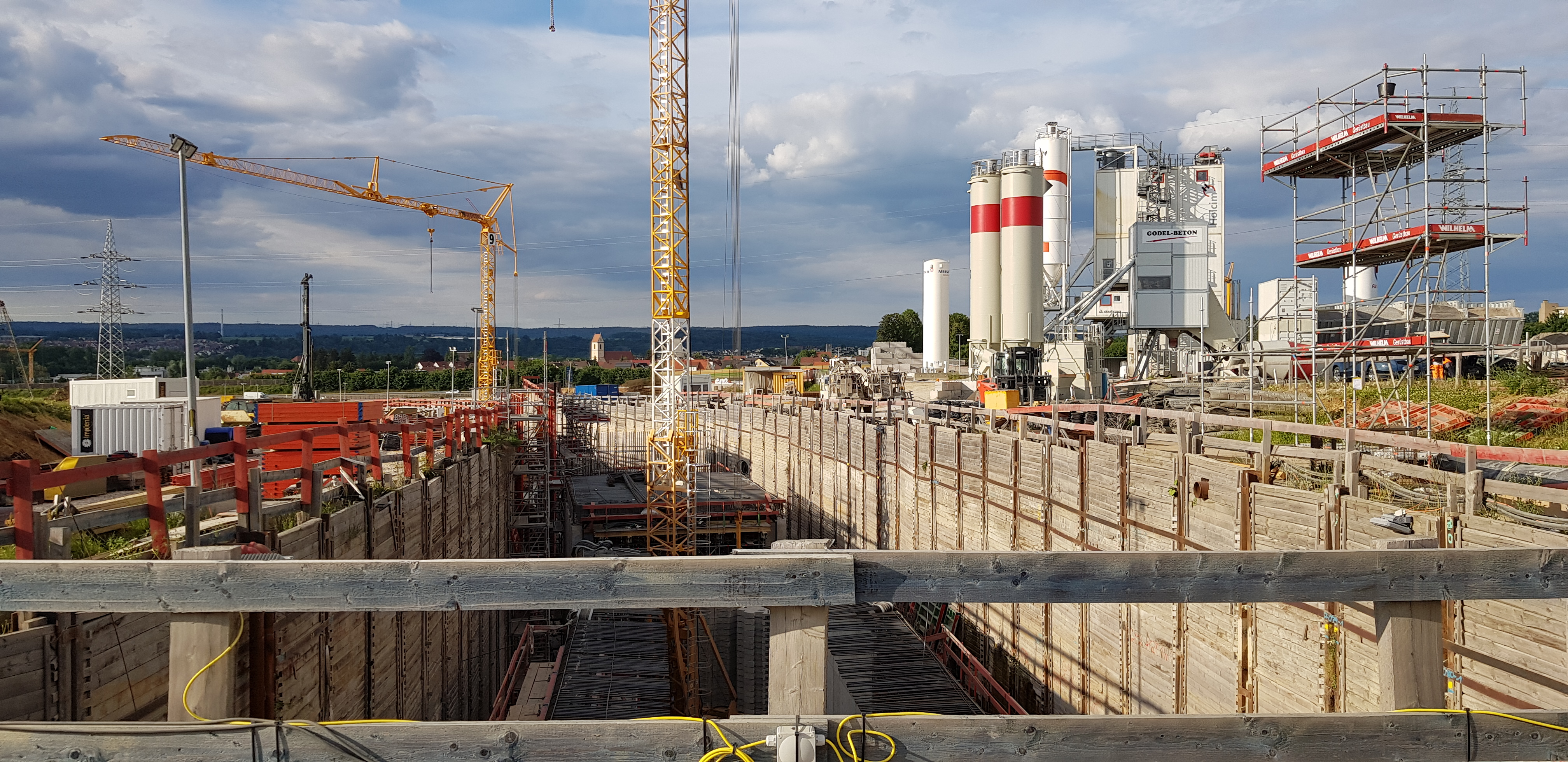 Bauarbeiten am nördlichen Ende des Tunnels der Kleinen Wendlinger Kurve mit vorgelagertem Trog im Mai 2020, mit Blick Richtung Wendlingen.